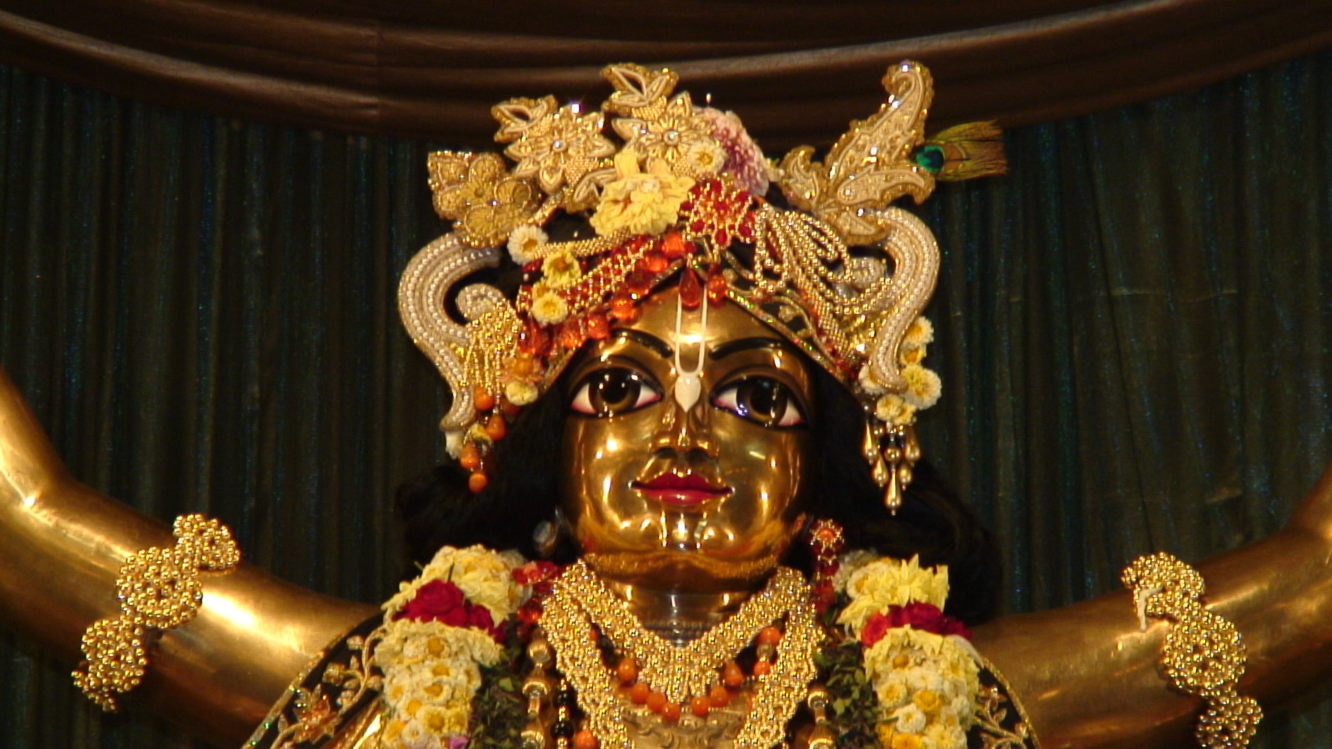 Gauranga Panca Tattva Mayapur